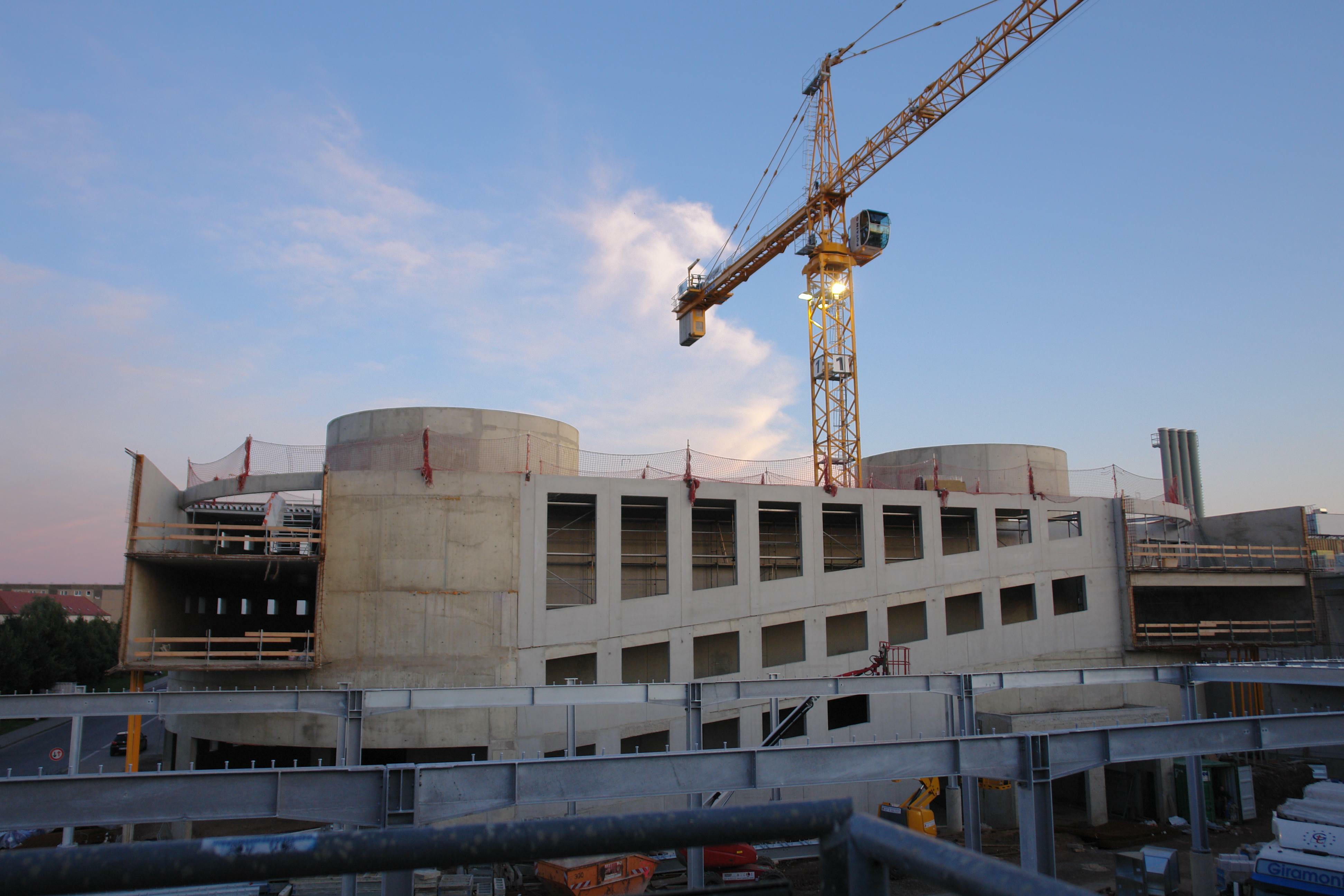 Elbepark Dresden, Erweiterung 2009